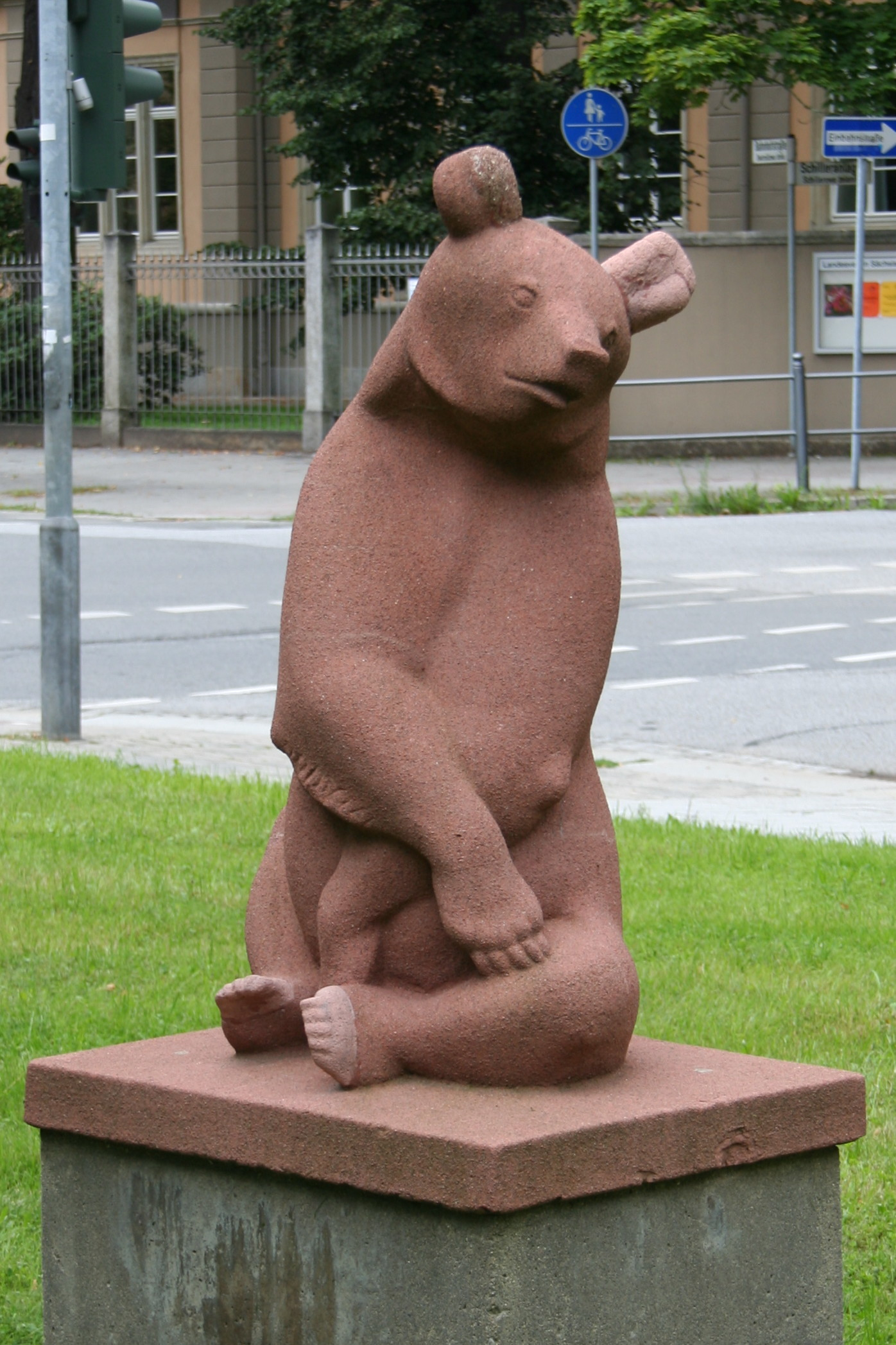 Rudolf Enderlein: Sitzender Bär, o. J. Standort: Bautzen, Grünanlage hinter der Post